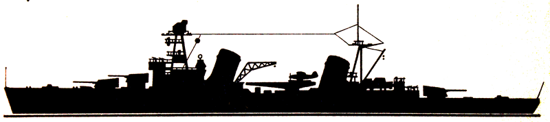 Силуэт крейсера "Киров" (1938г.)